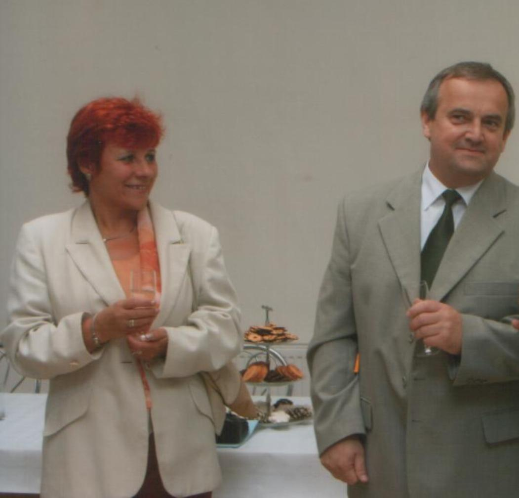 Emilia Aftewicz, dyrektor szpitala w 1997 r.